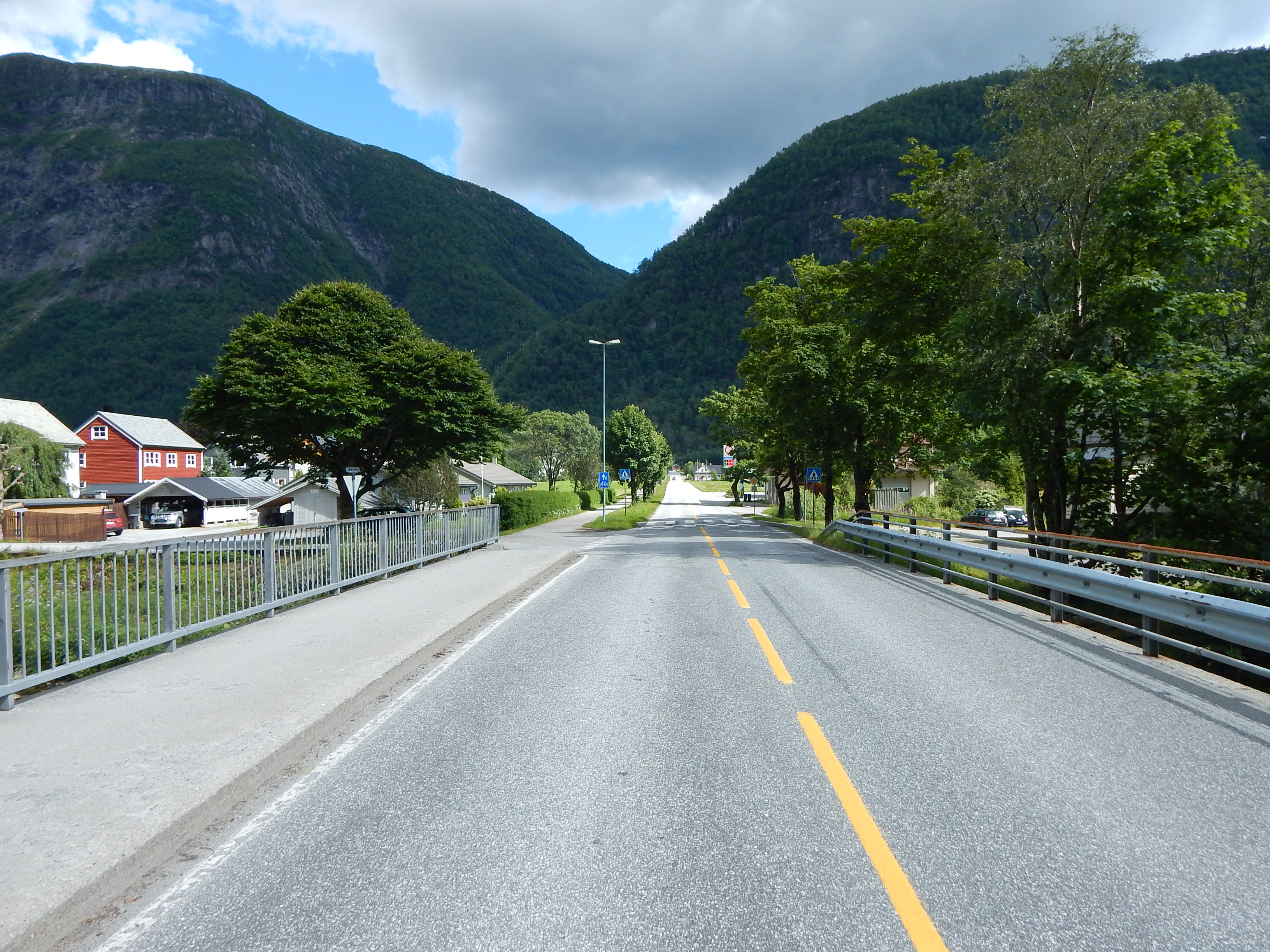 Fylkesvei 55 gjennom Vadheim